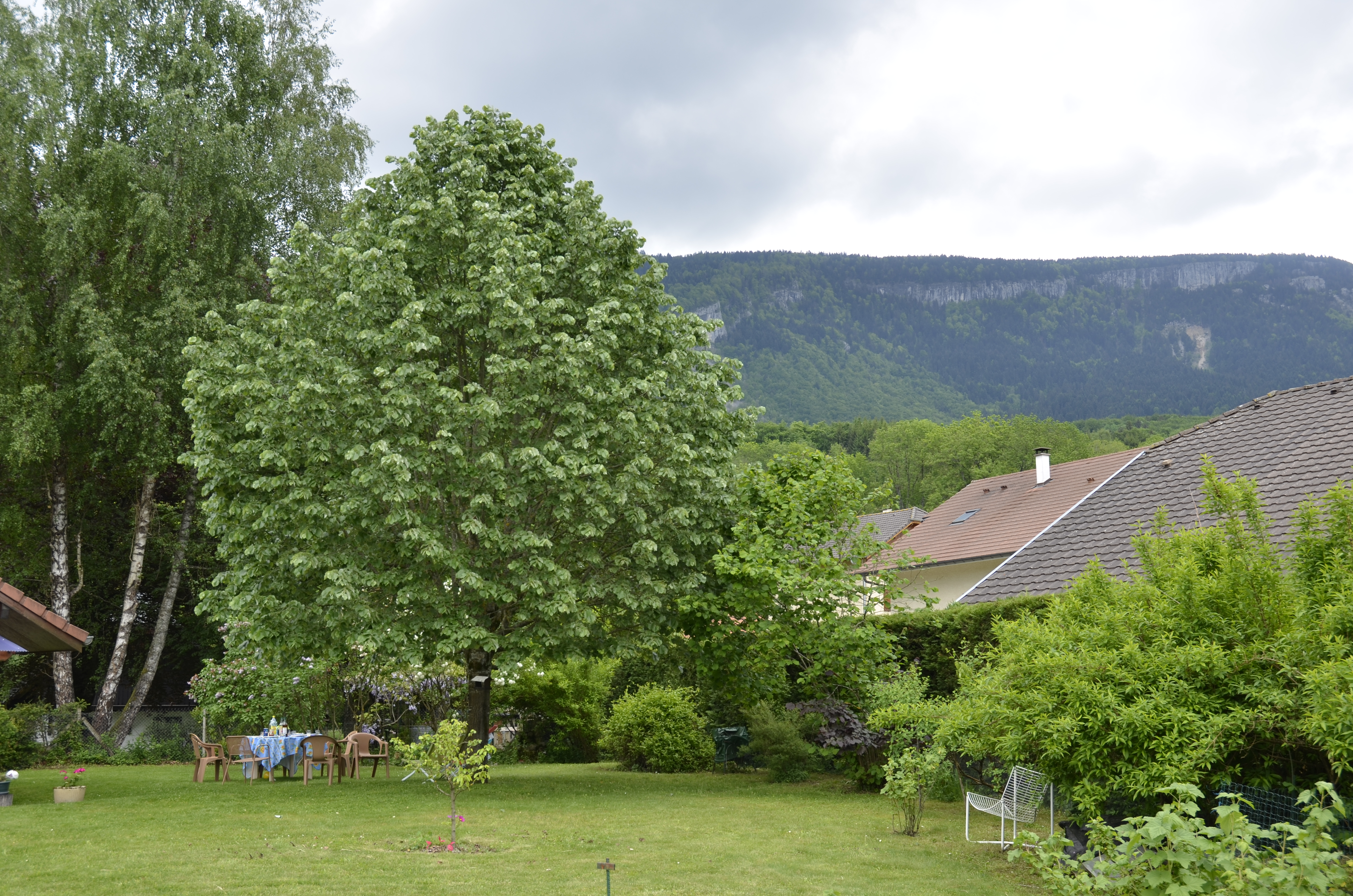 Tilleul, Cusy, mai 2015.